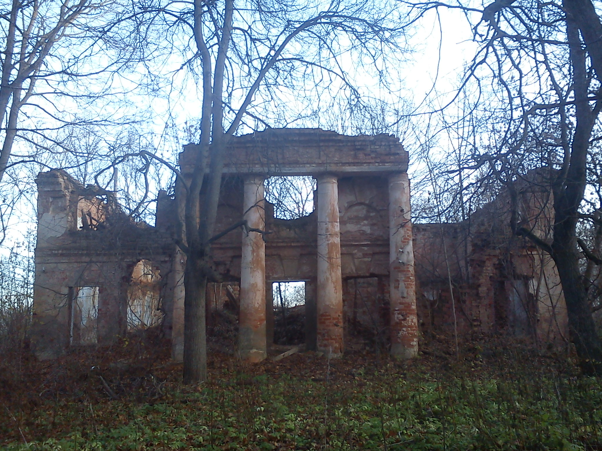 Antigua Finca